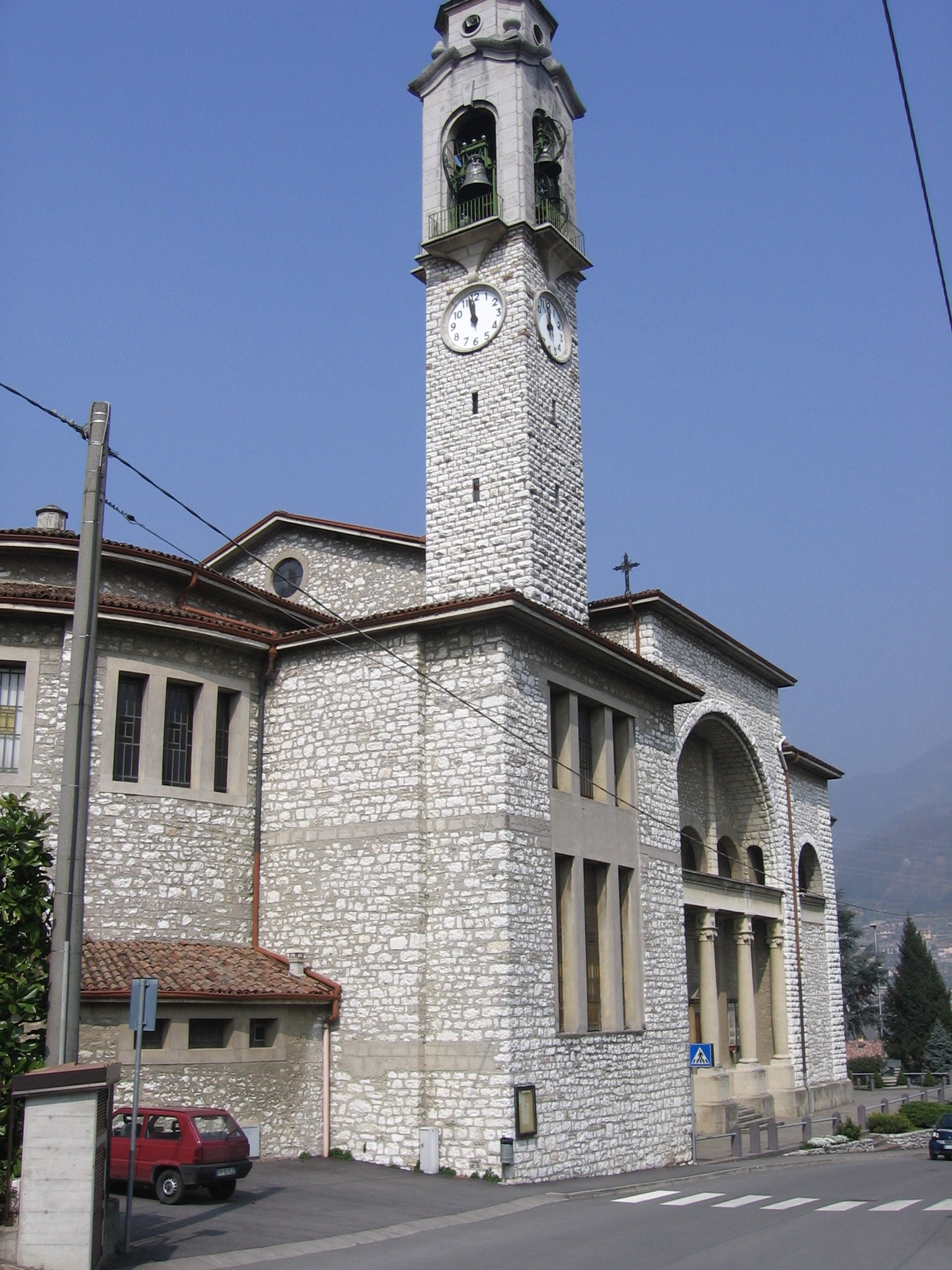 Chiesa parrocchiale di Cornale, Pradalunga, Bergamo, Italia